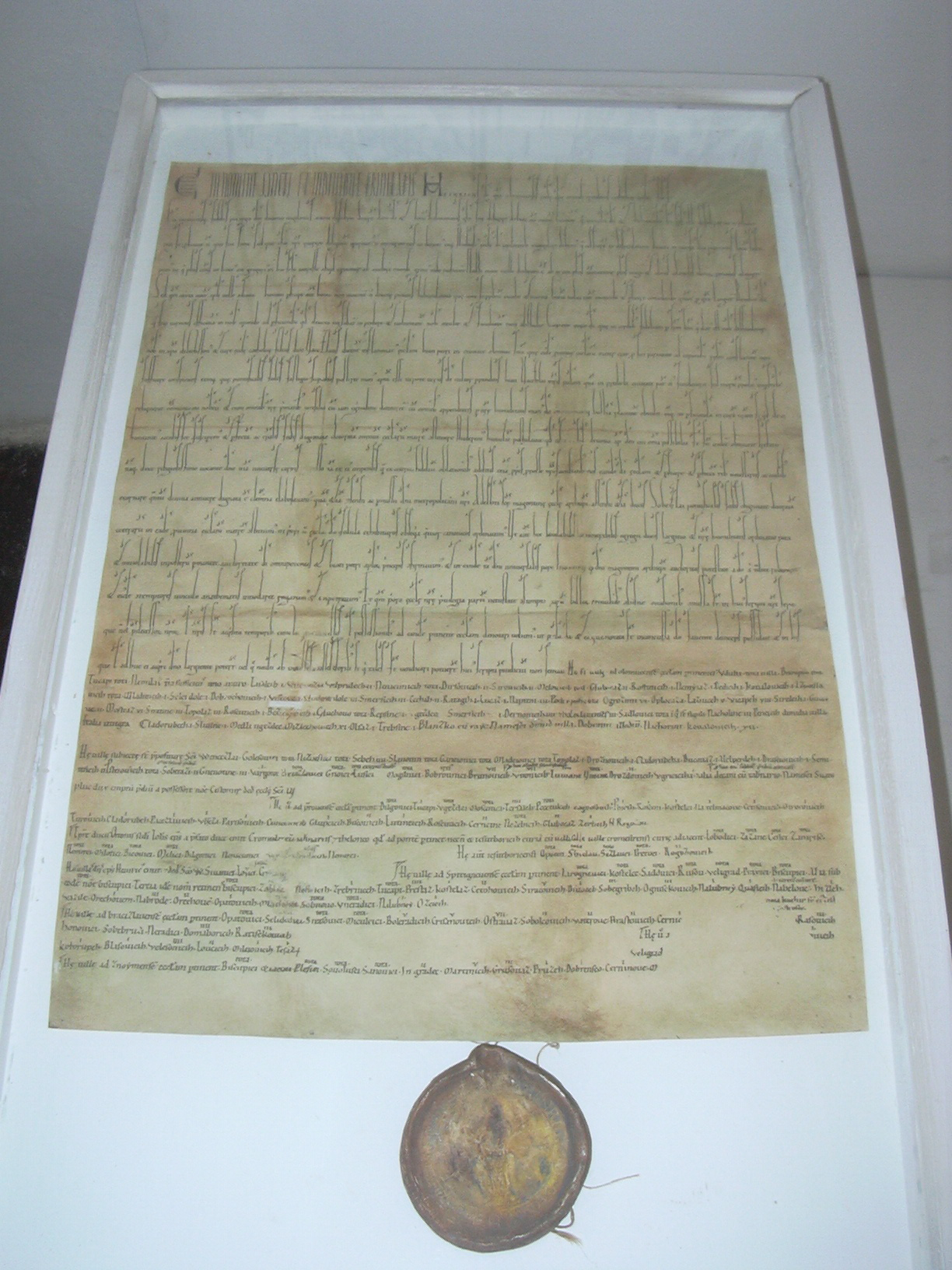 Kopie listiny olomouckého biskupa Jindřicha Zdíka z roku 1141 s nejstarší zprávou o Vyškově.